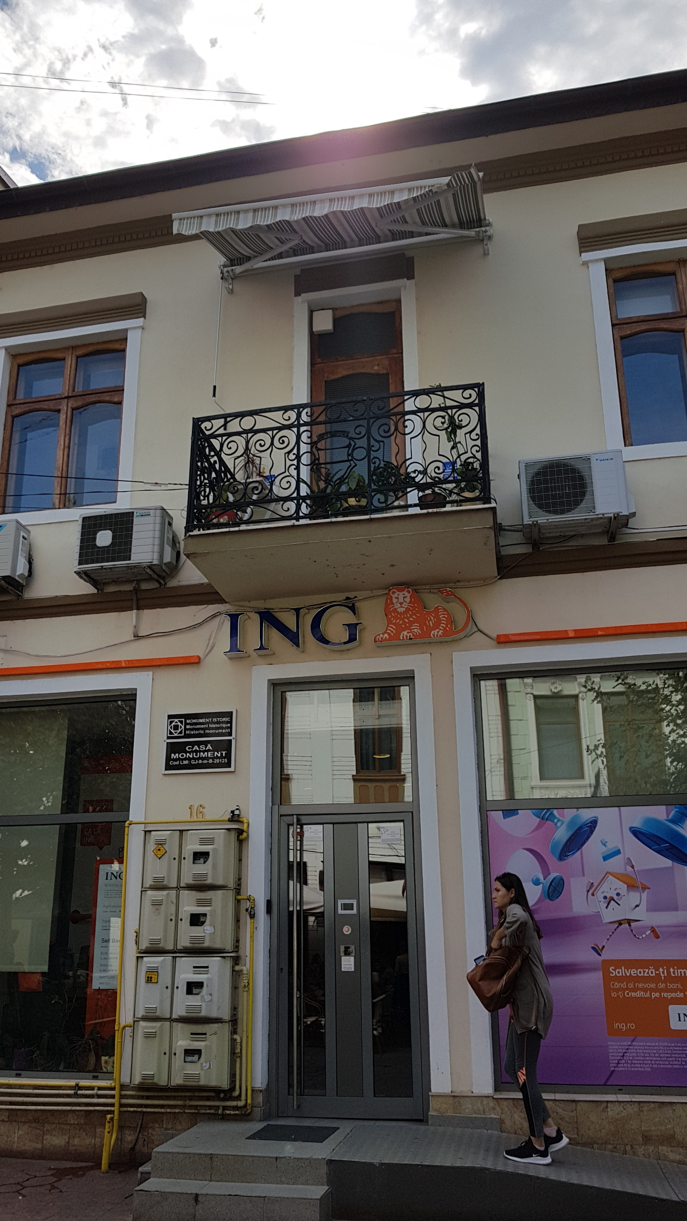 Casă centru